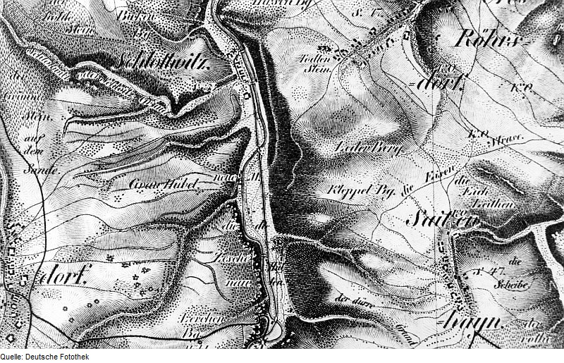 Original image description from the Deutsche Fotothek Glashütte-Schlottwitz. Oberreit, Sect. Dresden, 1821/22